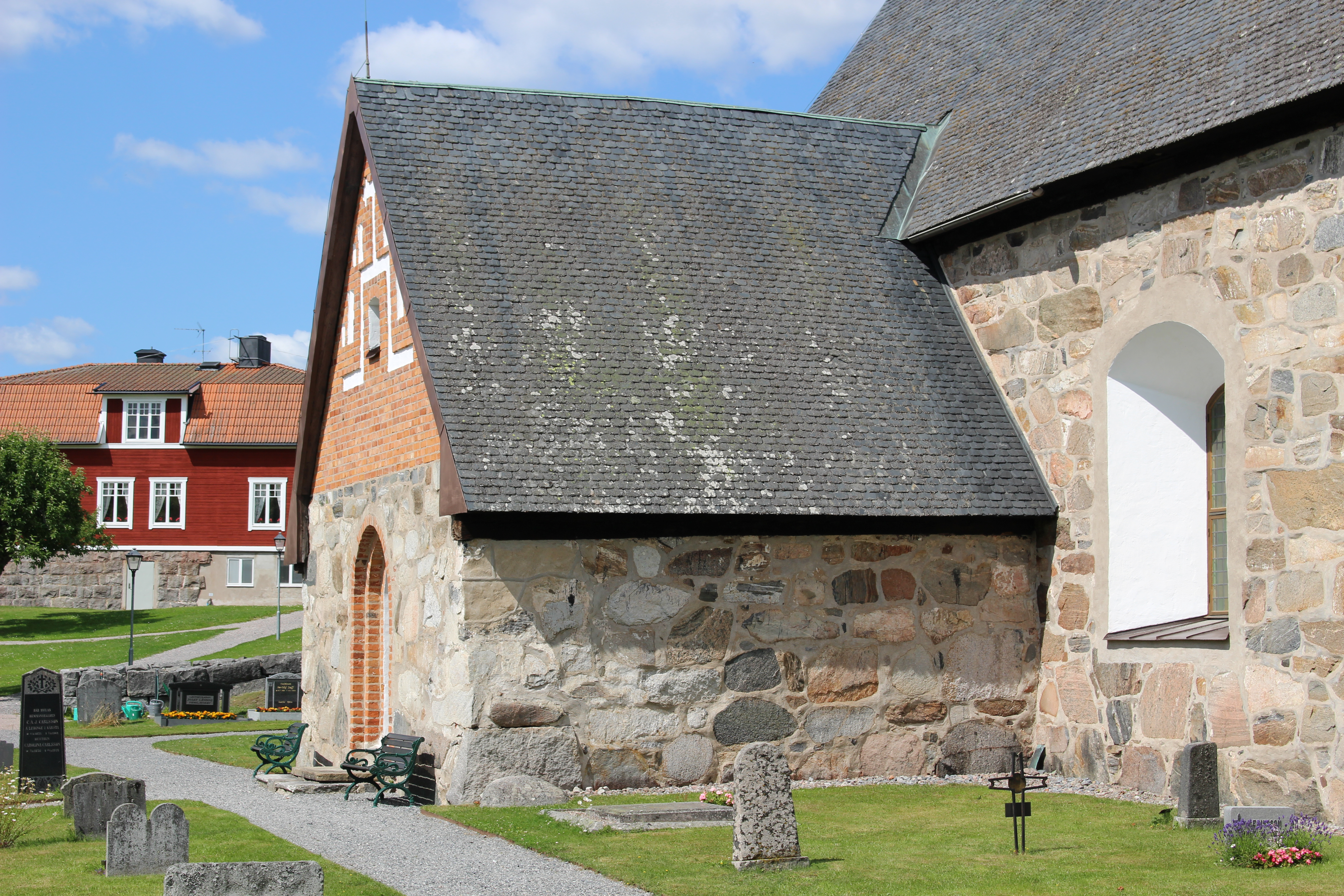 Kårsta kyrkas vapenhus från öster.